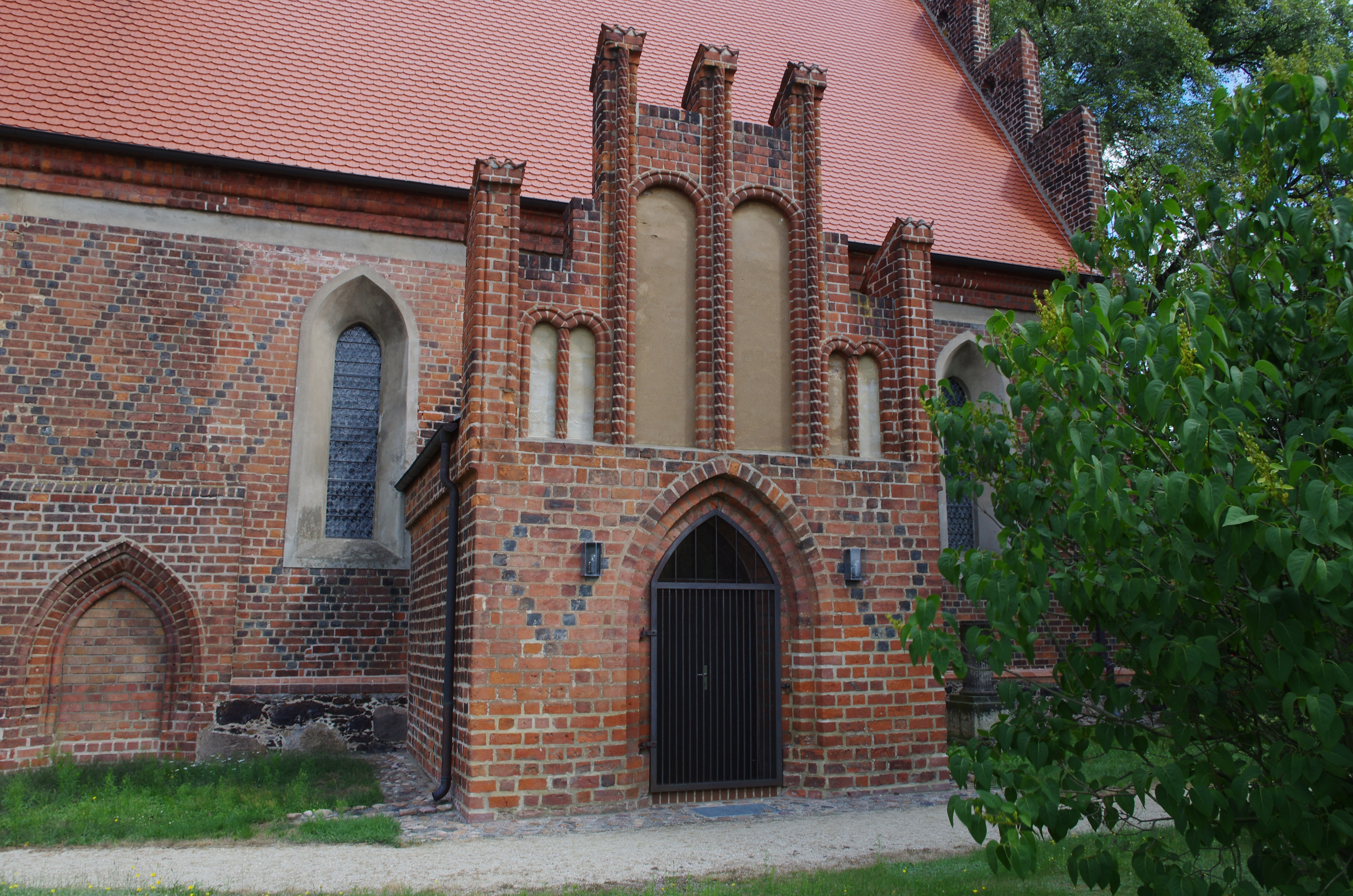 Briesen (Spreewald) in Brandenburg, Landkreis Spree-Neiße. Die Kirche ist denkmalgeschützt.